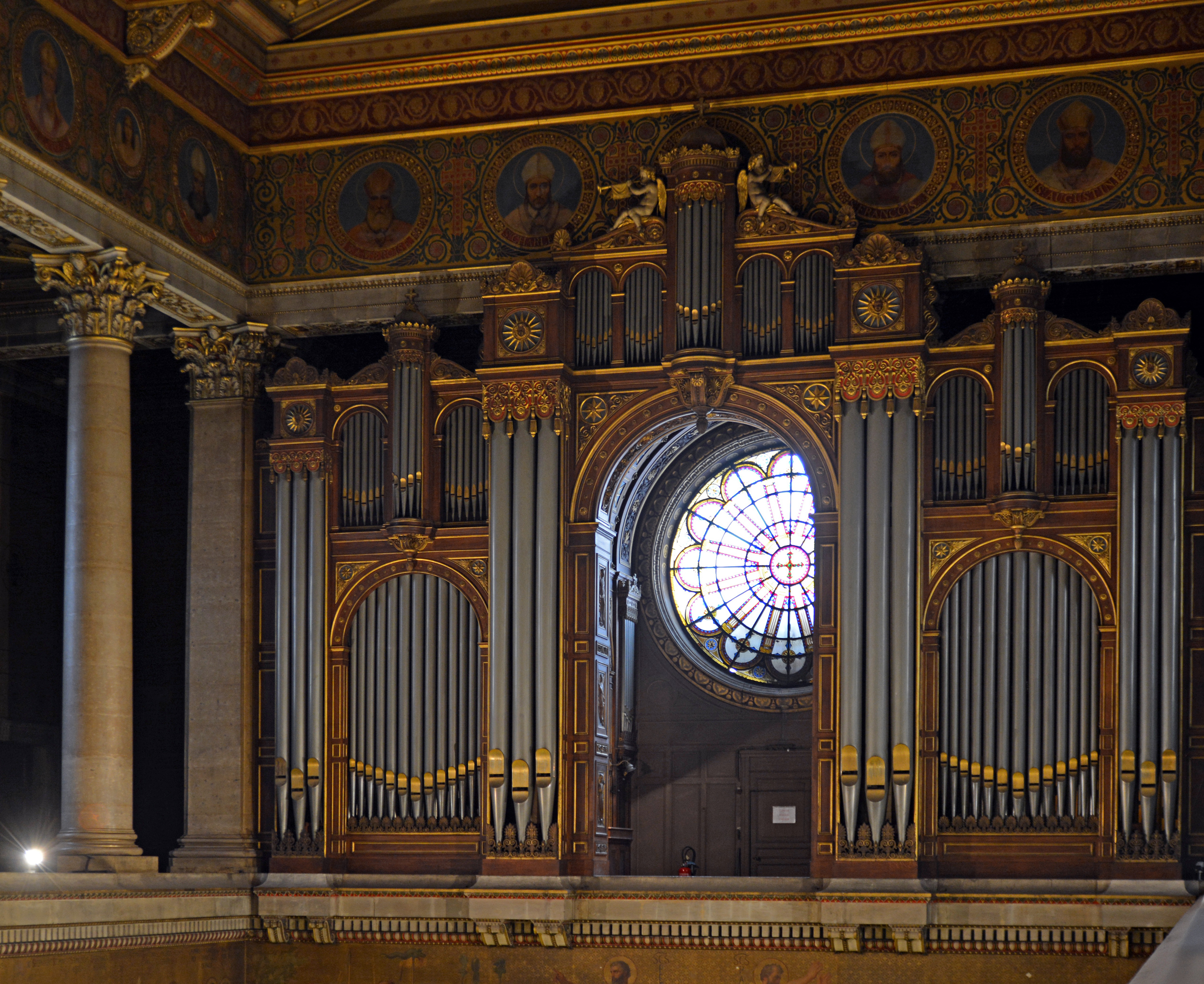 Orgue de l'église Saint-Vincent-de-Paul vue depuis la galerie, Paris 10 arrdt, France